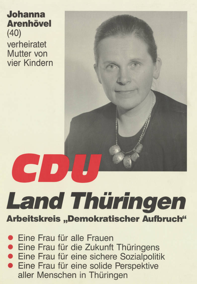 Johanna Arenhhövel (40) verheiratet Mutter von vier Kindern CDU Land Thüringen Arbeitskreis "Demokratischer Aufbruch" . Eine Frau für alle Frauen . Eine Frau für die Zukunft Thüringens . Eine Frau für eine sichere Sozialpolitik . Eine Frau für eine solide Perspektive aller Menschen in ThüringenAbbildung:PorträtfotoPlakatart:Kandidaten-/Personenplakat mit PorträtObjekt-Signatur:10-037 : 9Bestand:Landtagswahlplakate Thüringen (10-037)GliederungBestand10-18:Landtagswahlplakate Thüringen (10-037) » CDULizenz:KAS/ACDP 10-037 : 9 CC-BY-SA 3.0 DE